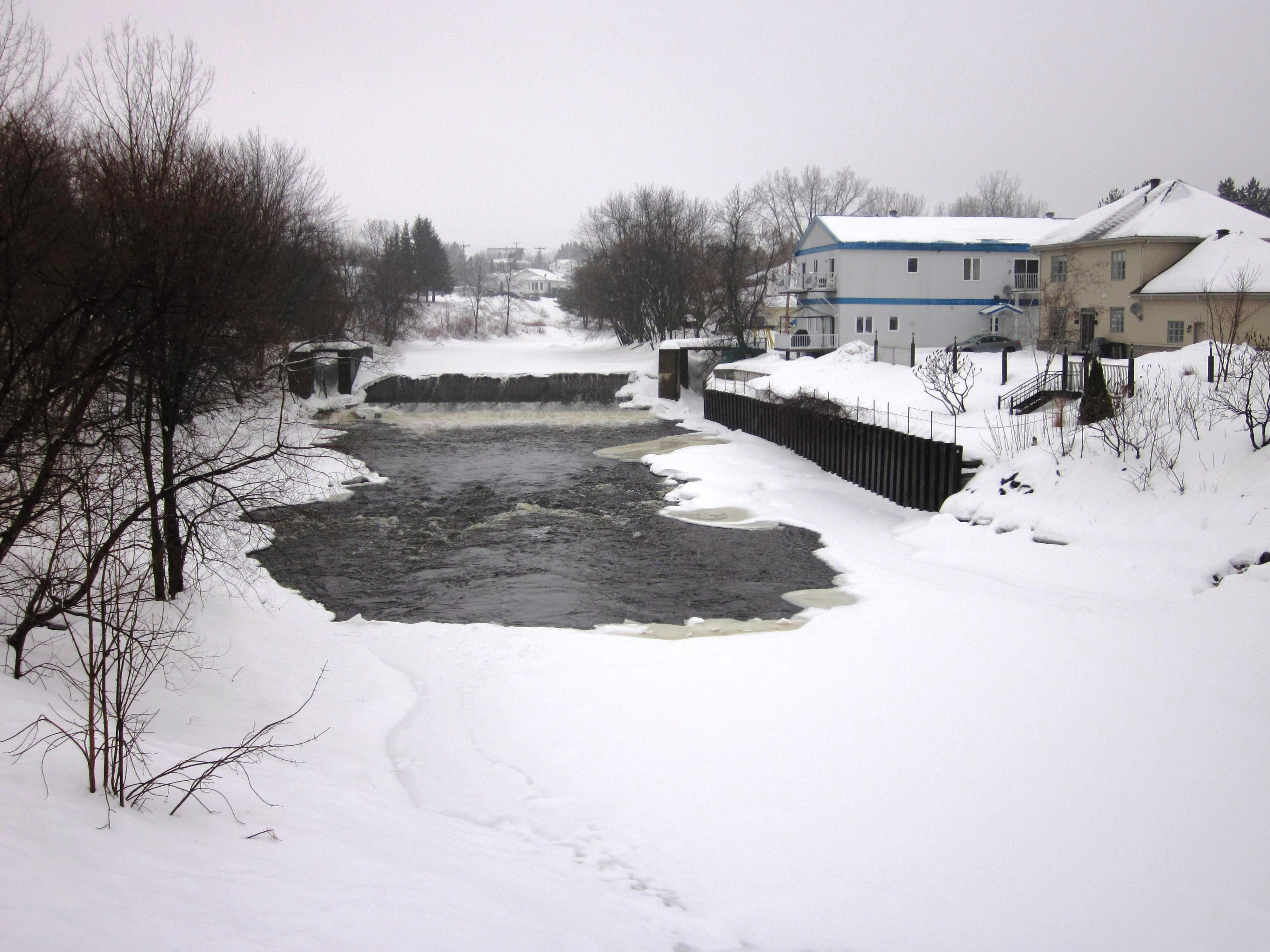 Rivière Maskinongé à partir du pont Galipeault à Maskinongé.